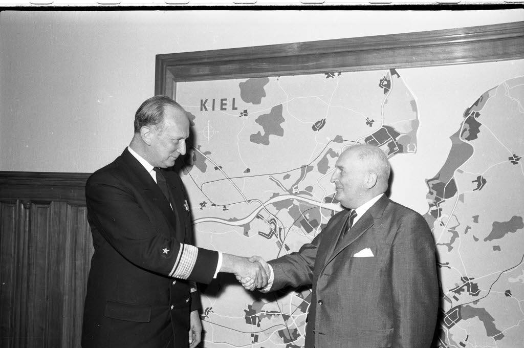 Bürgermeister Herbert Fuchs (rechts) verabschiedet Flottillenadmiral Adalbert von Blanc (links), der mit seiner Dienststelle nach Wilhelmshaven verlegt wurde.